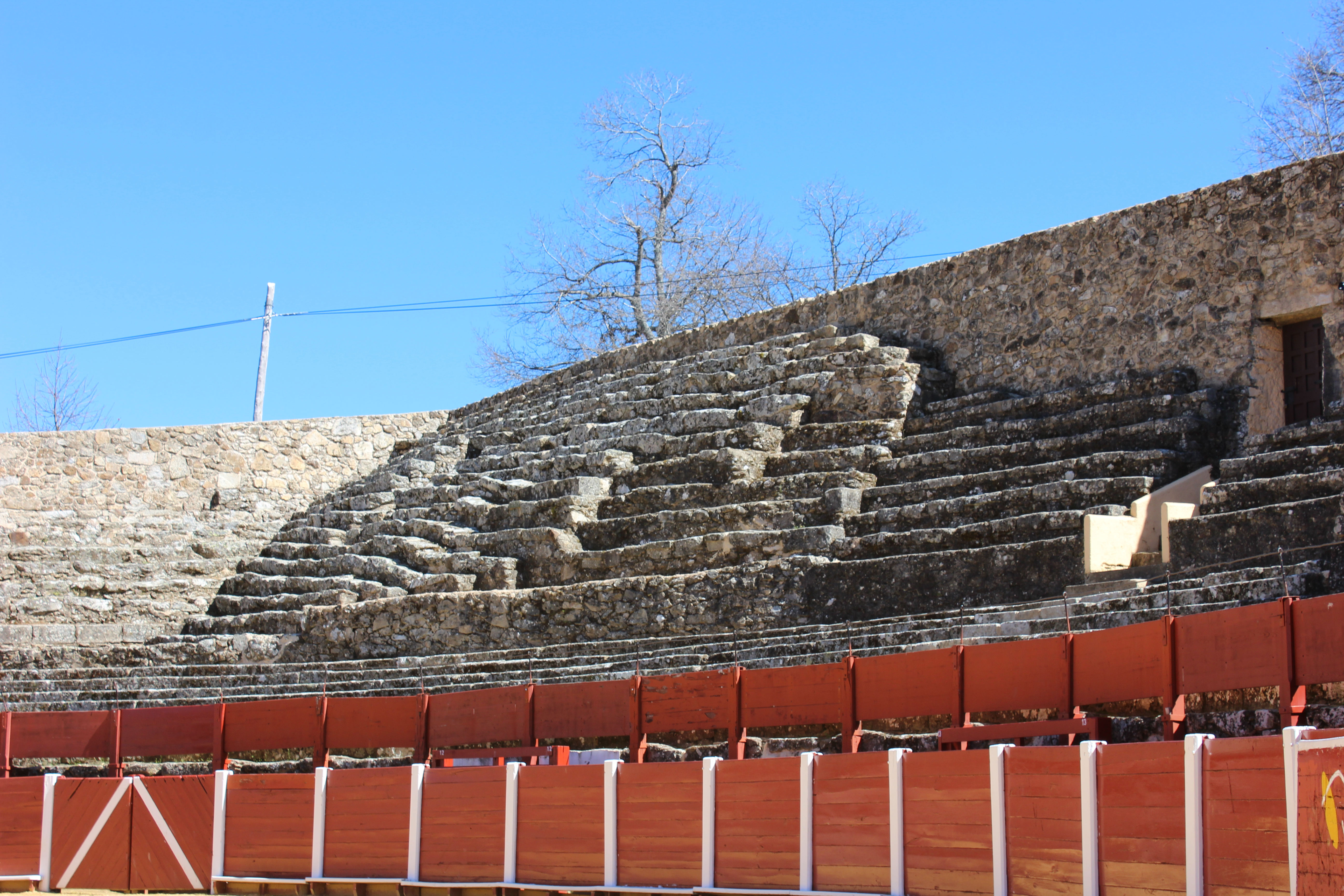 حلبة مصارعة الثيران في بيخار في مقاطعة سلامنكا الإسبانية.